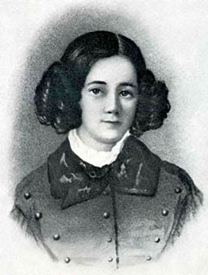 Писательница-мемуаристка и художница Е. И. Бибикова (в замужестве Раевская) родилась 15 ноября 1817 году. Внучка генерала екатерининских времен Гавриила Ильича Бибикова, дочь участника войны 1812 года, подполковника Ивана Петровича Бибикова. Одной из ярких страниц жизни Е. И. Бибиковой стала встреча в имении отца в 1834 году с поэтом А. И. Полежаевым. Светлое чувство взаимной любви вдохновило 16-летнюю Екатерину Бибикову на создание акварельного портрета поэта, поэт посвятилей несколько стихотворений